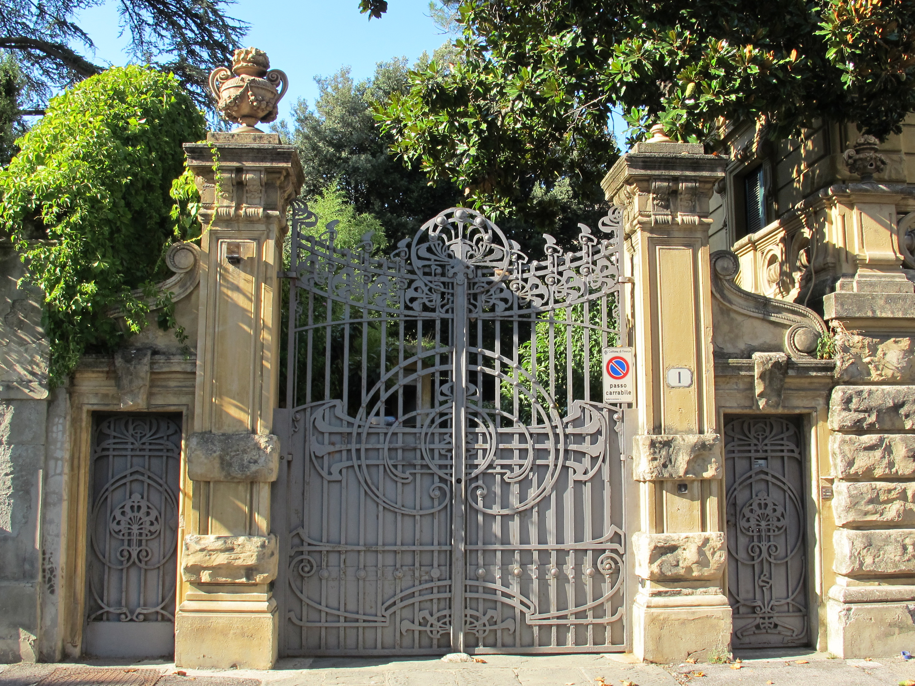 Viale Bernardo Segni (Firenze)